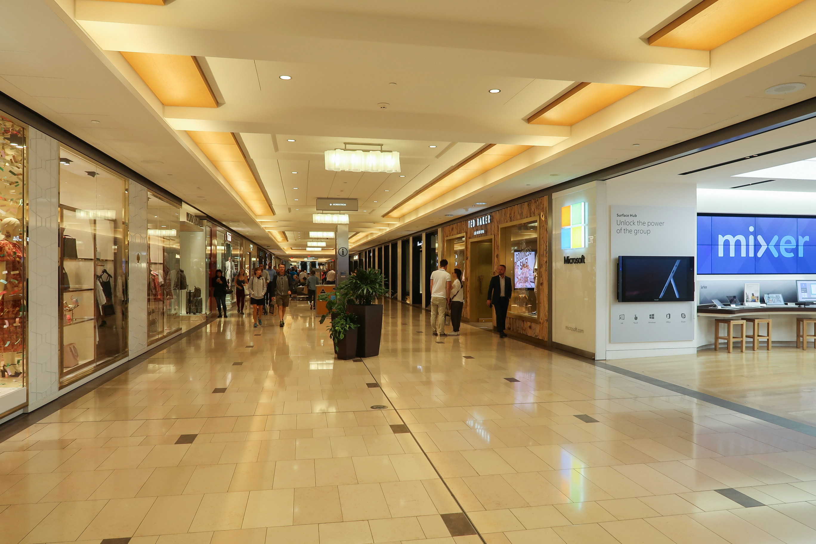 CF Pacific Centre Basement access